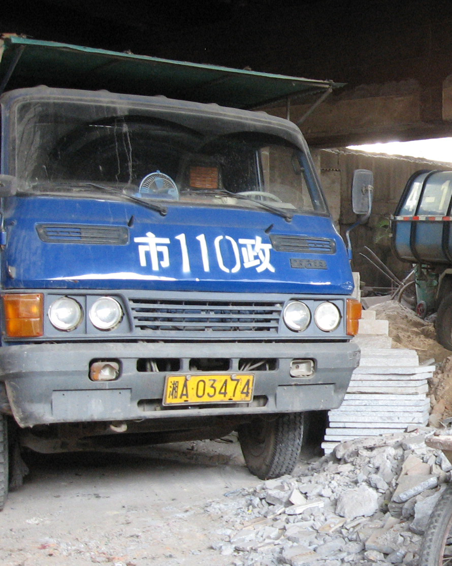 (Nanjing) Yuejin NJ131 truck (跃进NJ131)